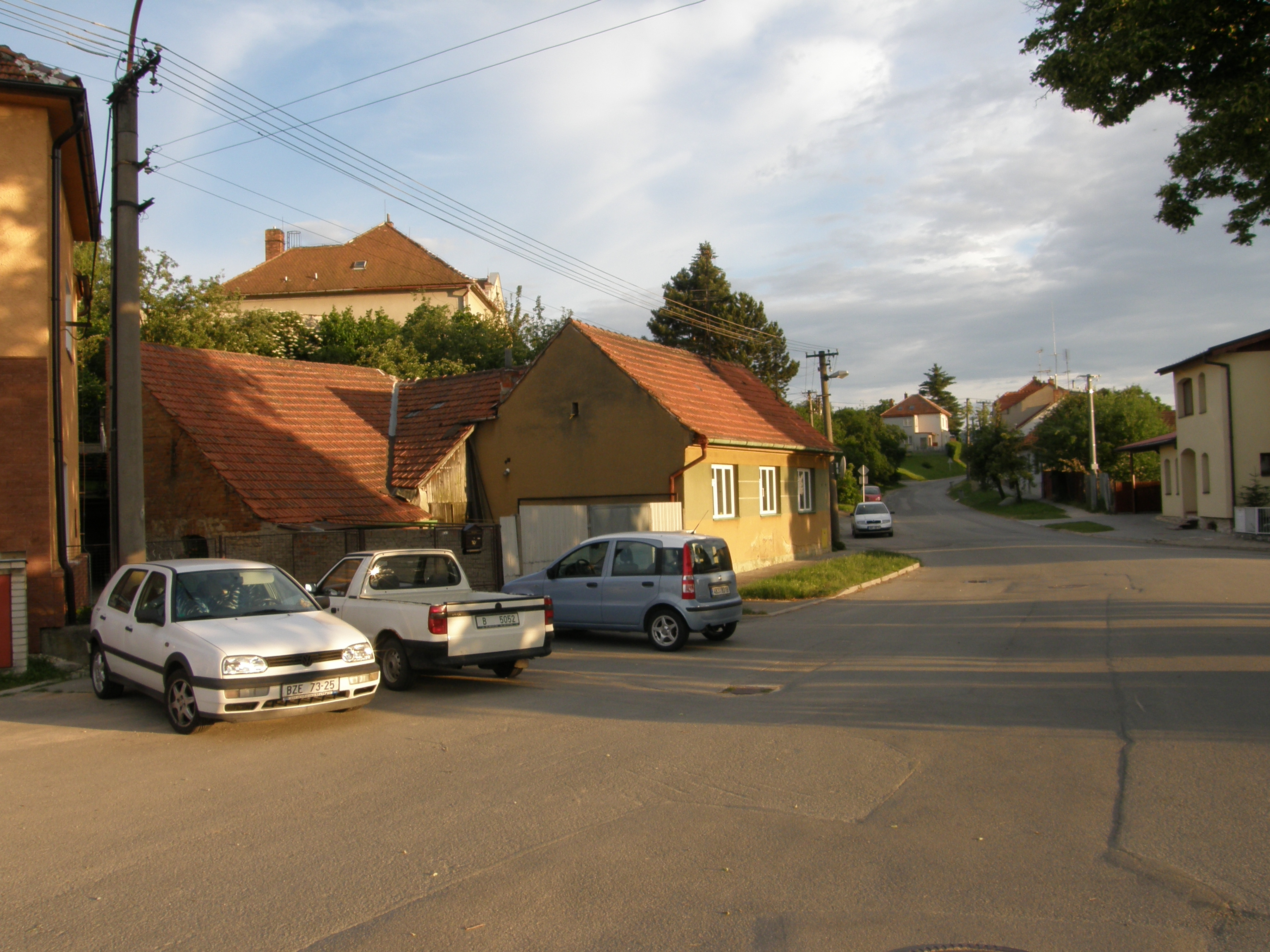 Blansko - Horní Lhota